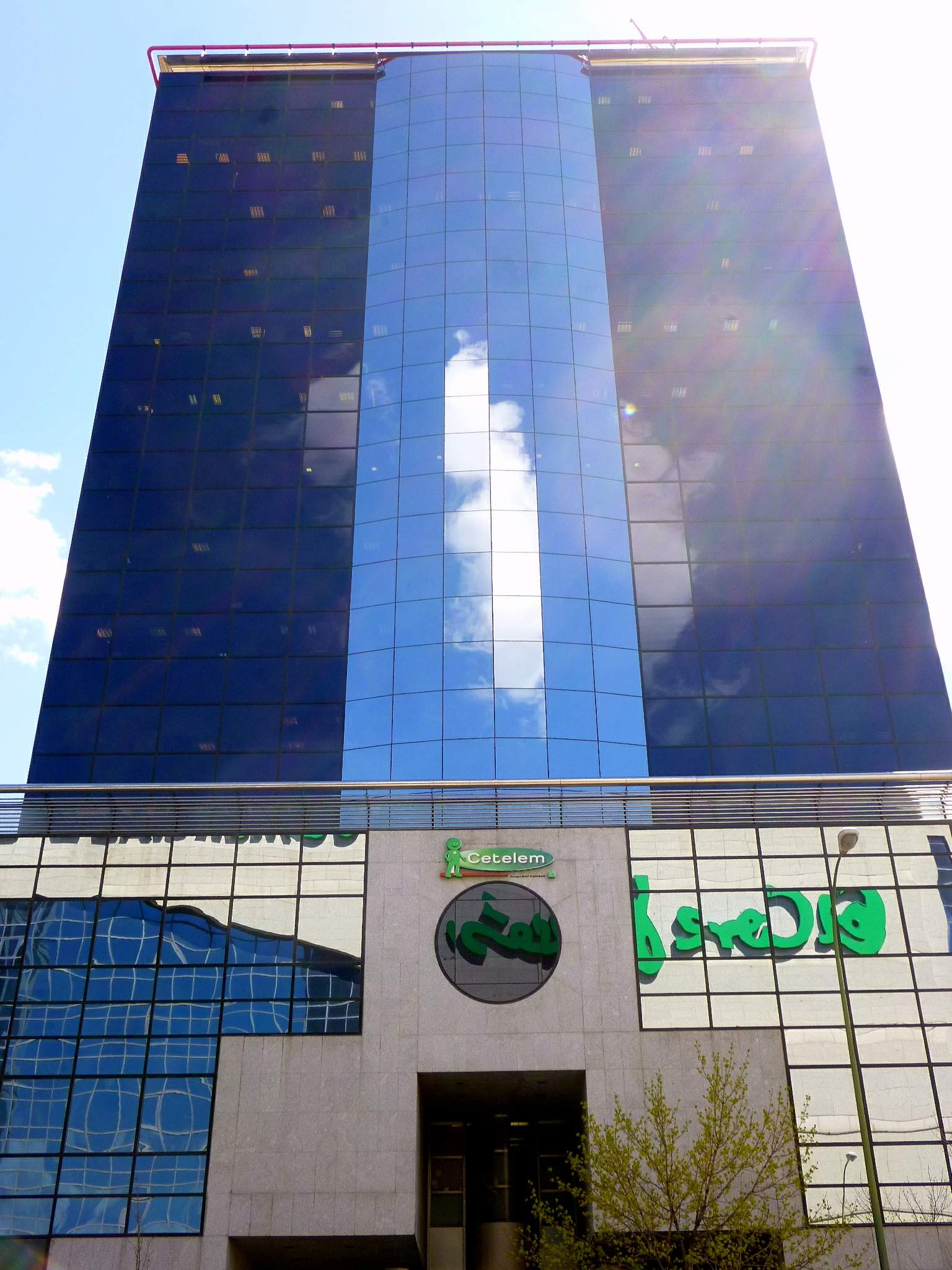 Madrid - Edificio Retama 3